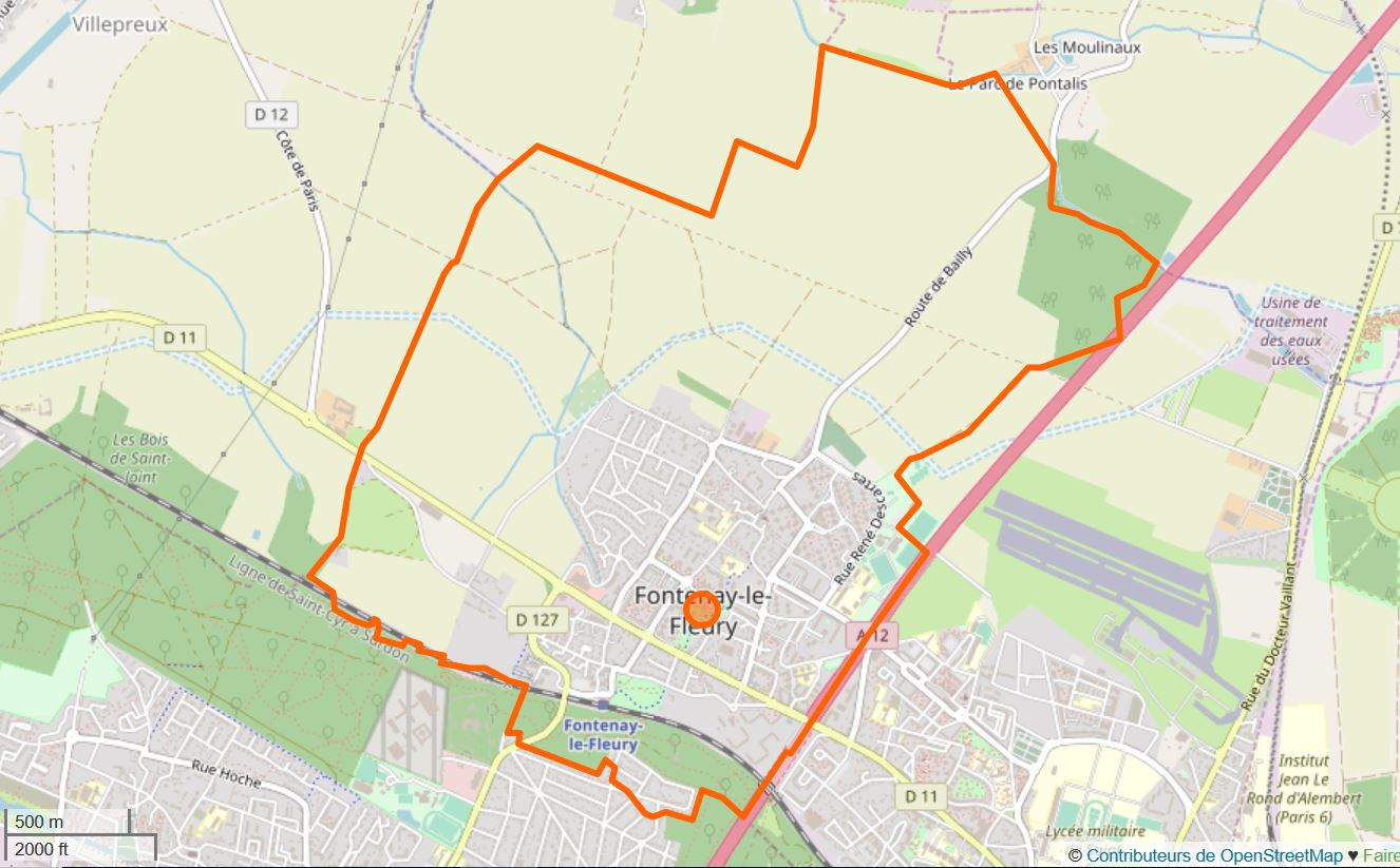 Cette carte a été créée à partir des données du projet openstreetmap. This map may be incomplete, and may contain errors. Don't rely solely on it for navigation.